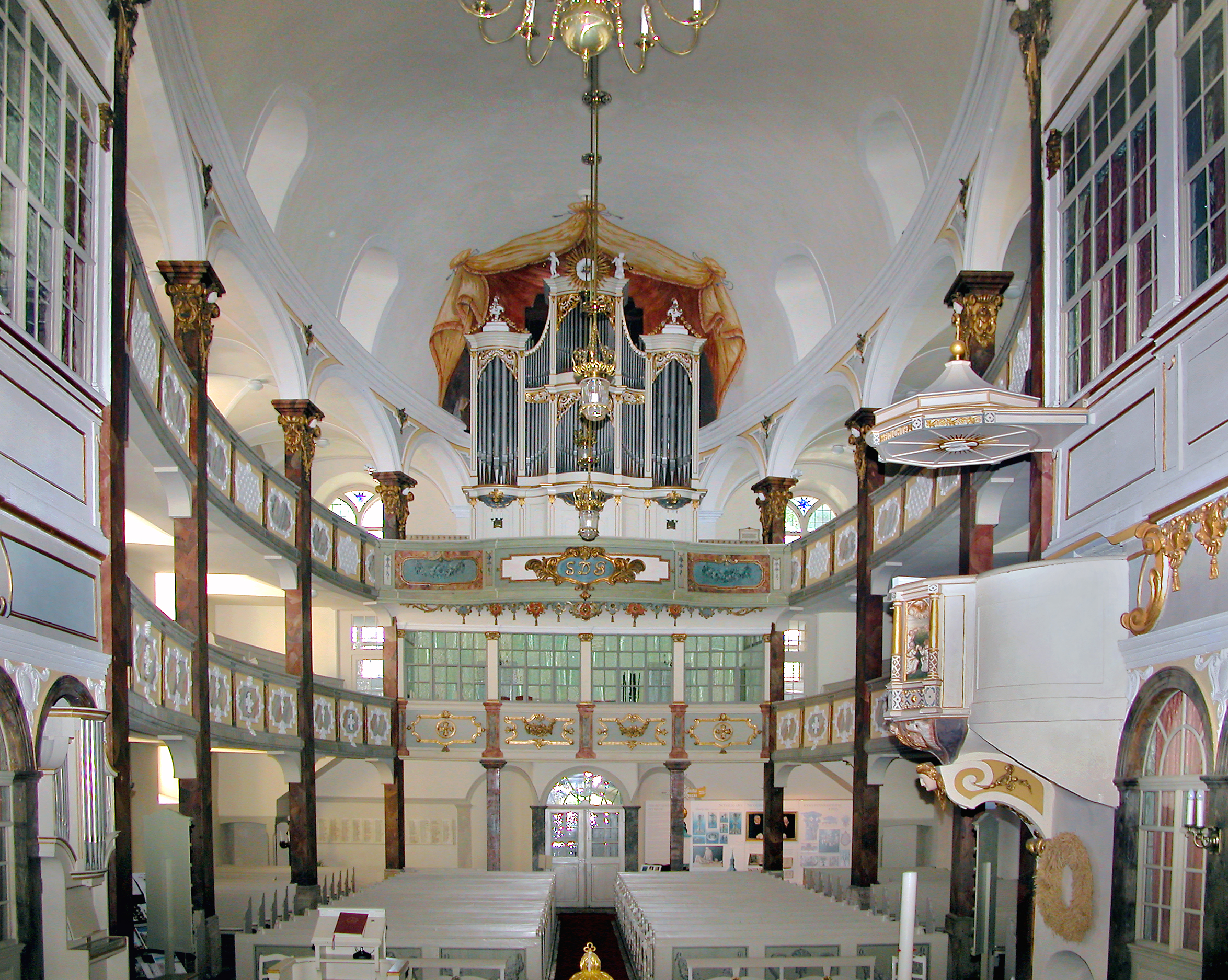 18.05.2007 01896 Pulsnitz, Kirchplatz (GMP: 51.181899,14.011805): St. Nikolai Kirche, Ersterwähnung 1473. Nach Bränden errichtet 1742-1745 Baumeister Andreas Hünichen (George Bähr Schüler) in dem gotischen Langhaus eine barocke Emporenkirche. 1779 wird die vom Pulsnitzer Orgelbauer Pfützner geschaffene Orgel in Dienst gestellt. Der Rokokoprospekt ist bis heute erhalten. [DSCN28024.TIF]20070518325.JPG(c)Blobelt